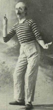 El actor español Salvador Videgain en una escena del sainete lírico Por peteneras, de Pedro Muñoz Seca, con música de Rafael Calleja